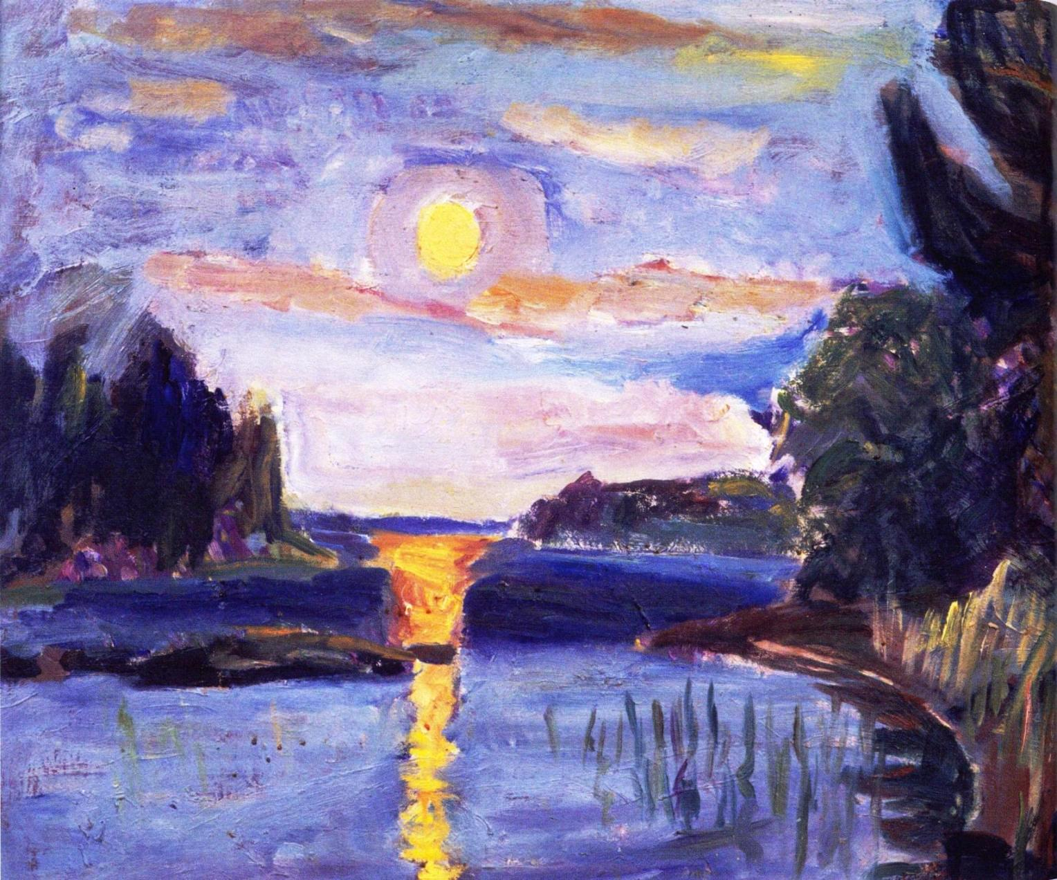 Kullervo Koiviston maalaus kuutamomaisemasta.